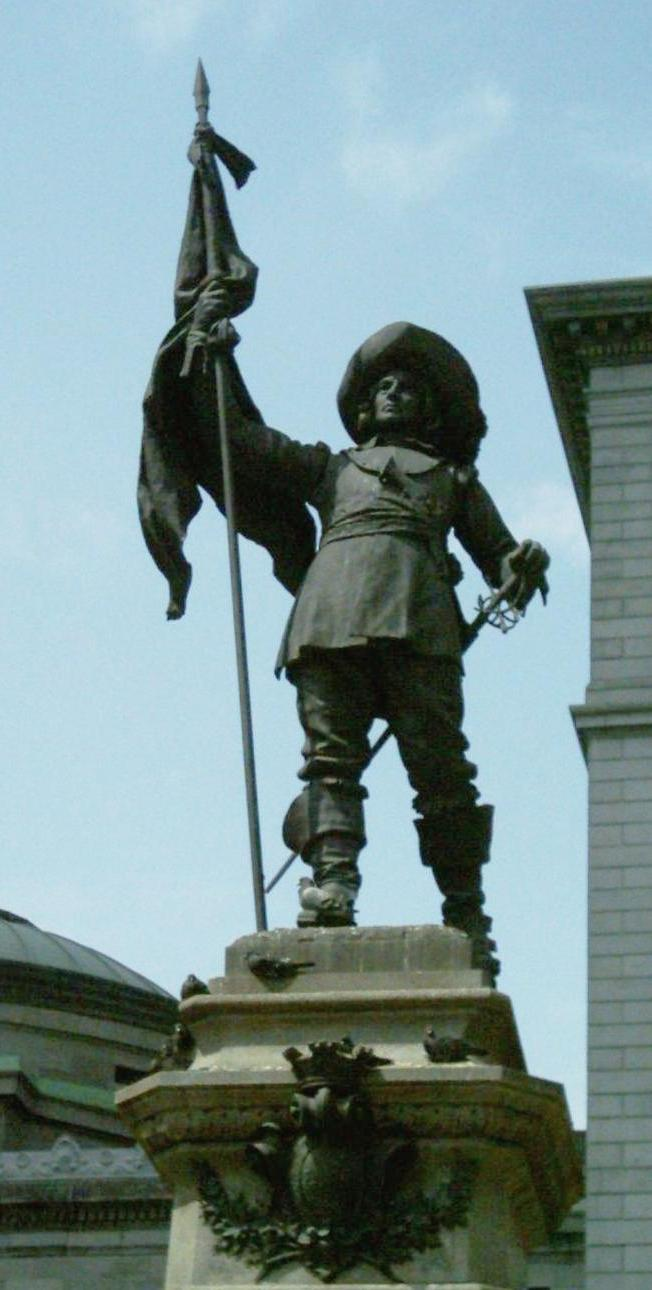 Monument à Maisonneuve, Place d'Armes, Montréal.